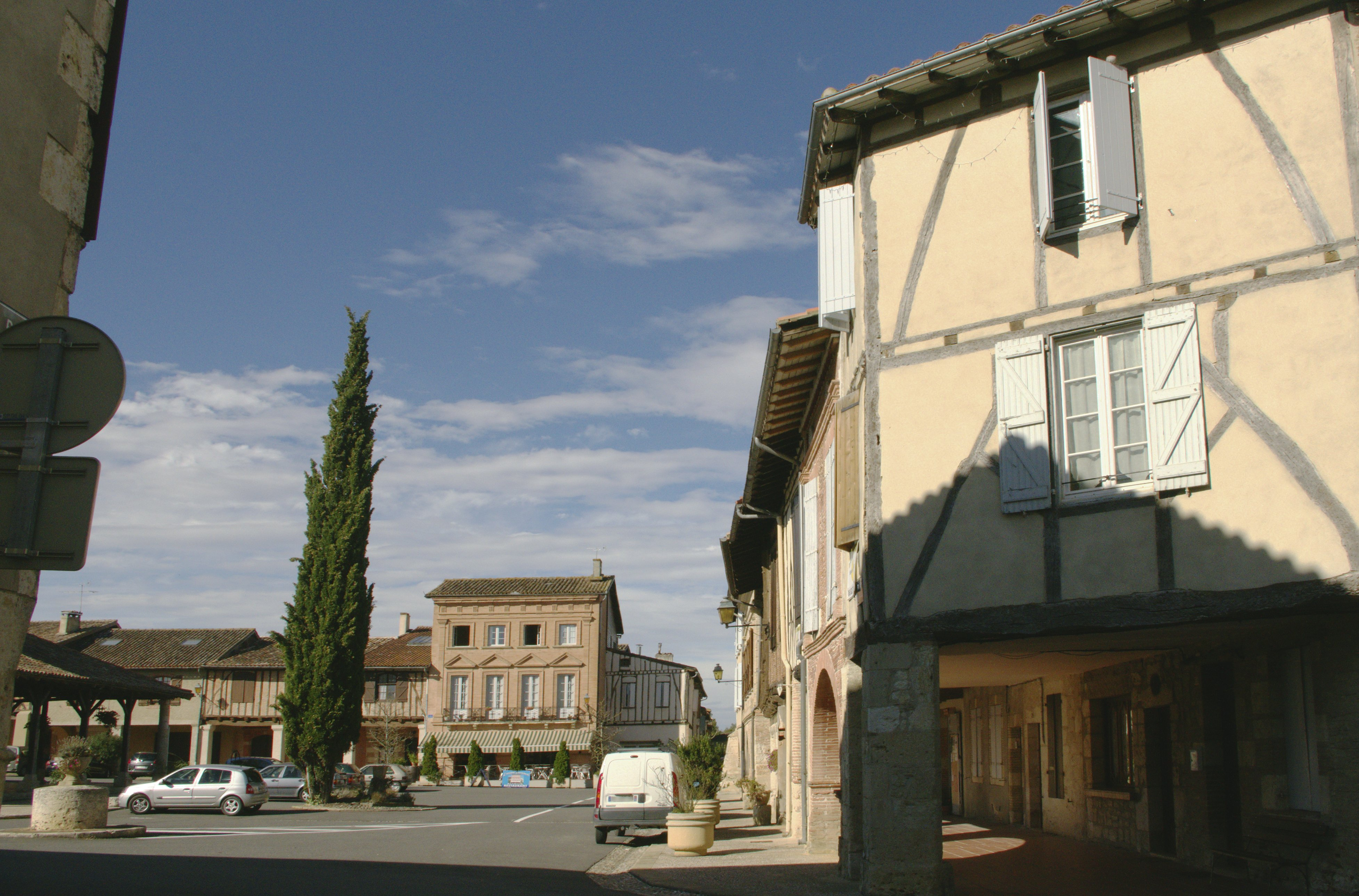 Cologne dans le Gers, France. - Halle et place.